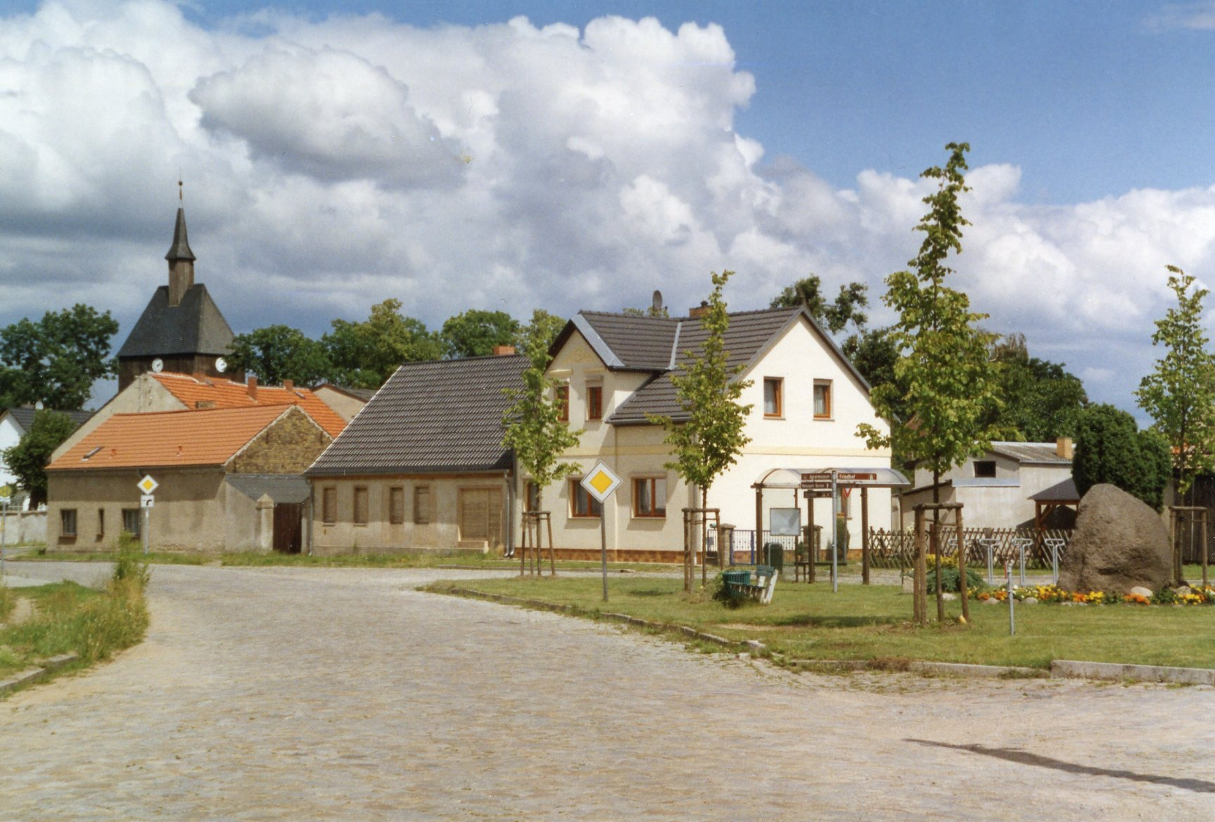 Teil des historischen Dorfkerns von Wandlitz (Ort)